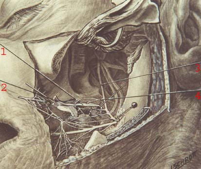 Die Lage des Juxtaoralen Organs, W. Zenker